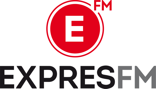 Logo stanice Expres FM